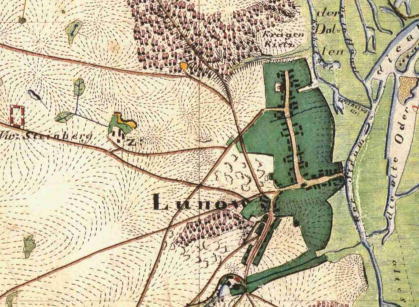 Lunow mit dem Wohnplatz Vorwerk Steinberg, Gemeinde Lunow-Stolzenhagen, Lkr. Barnim, Brandenburg, Ausschnitt aus dem Urmesstischblatt 3050 Lunow von 1826